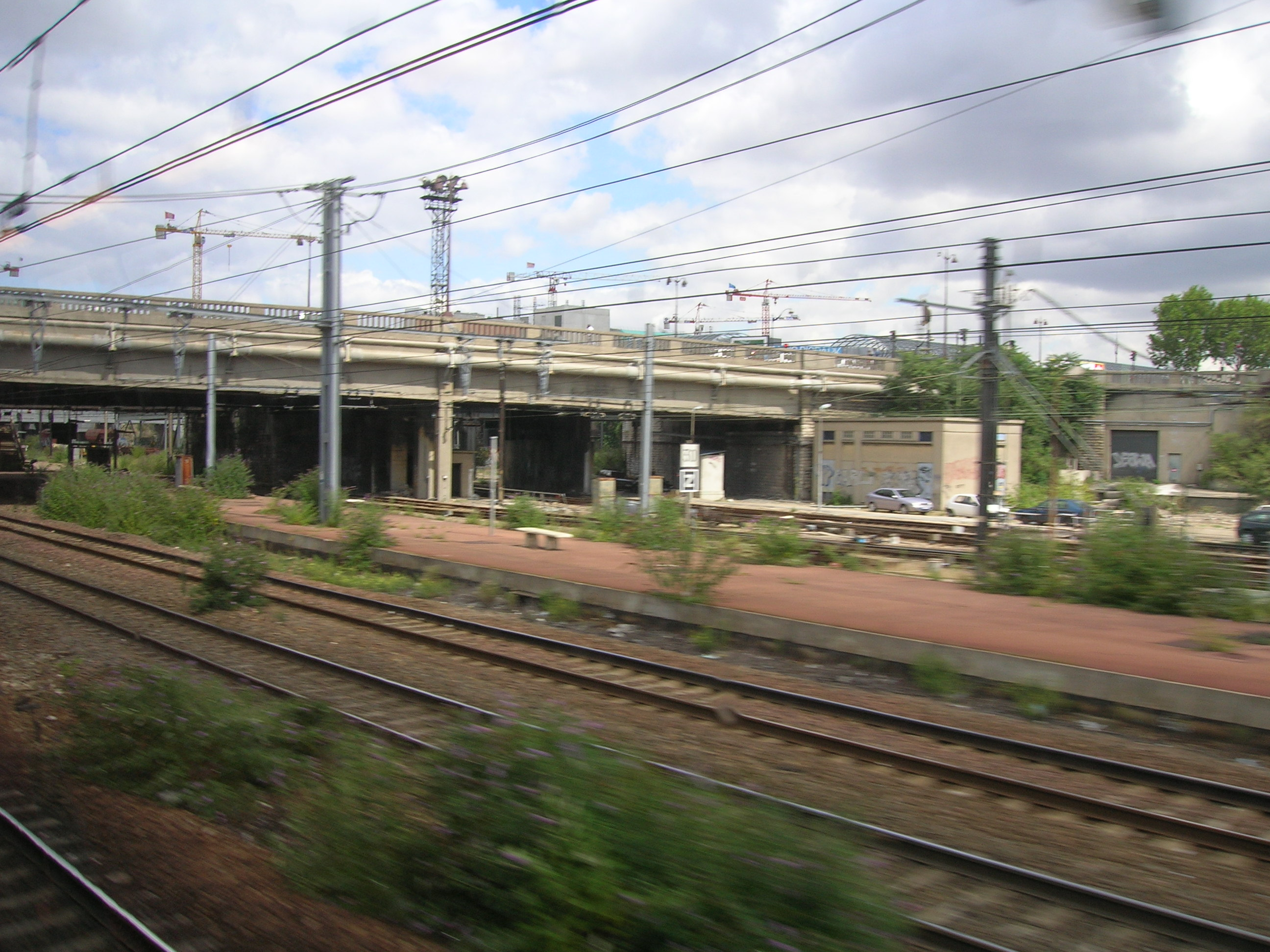 Ancienne gare du Boulevard Masséna, Paris